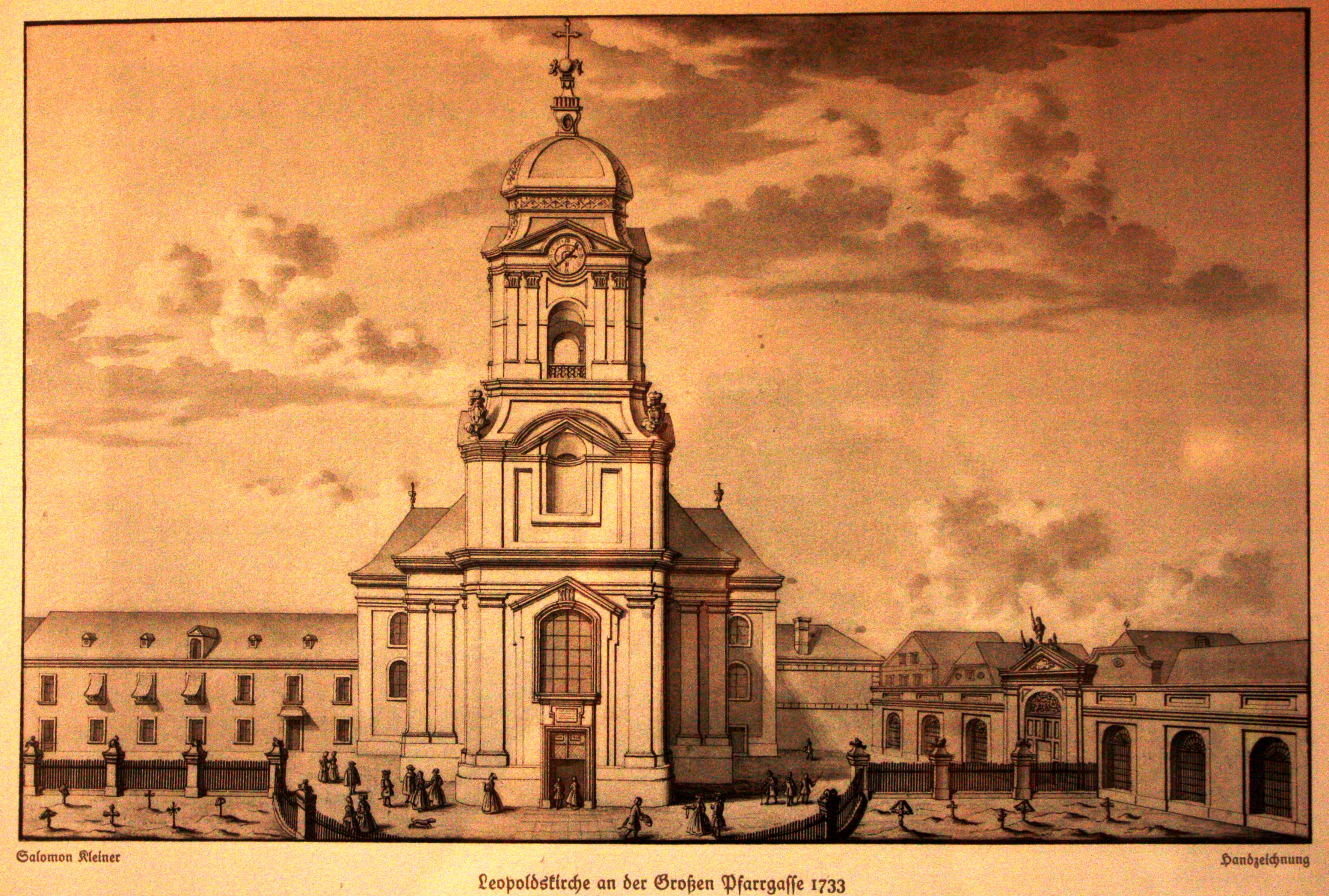 Pfarre Wien Leopoldstadt, Große Pfarrgasse, Wien, Vienna